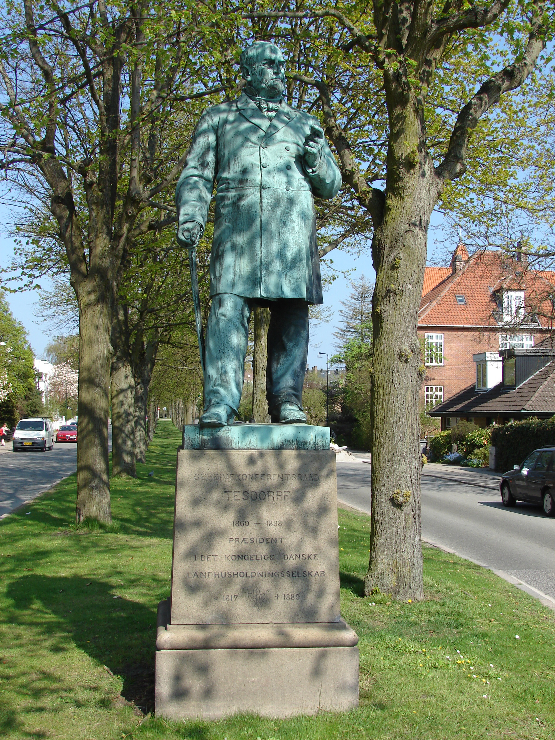 Edward Tesdorpf af Theobald Stein (1829-1901), Tesdorpfsvej, Frederiksberg